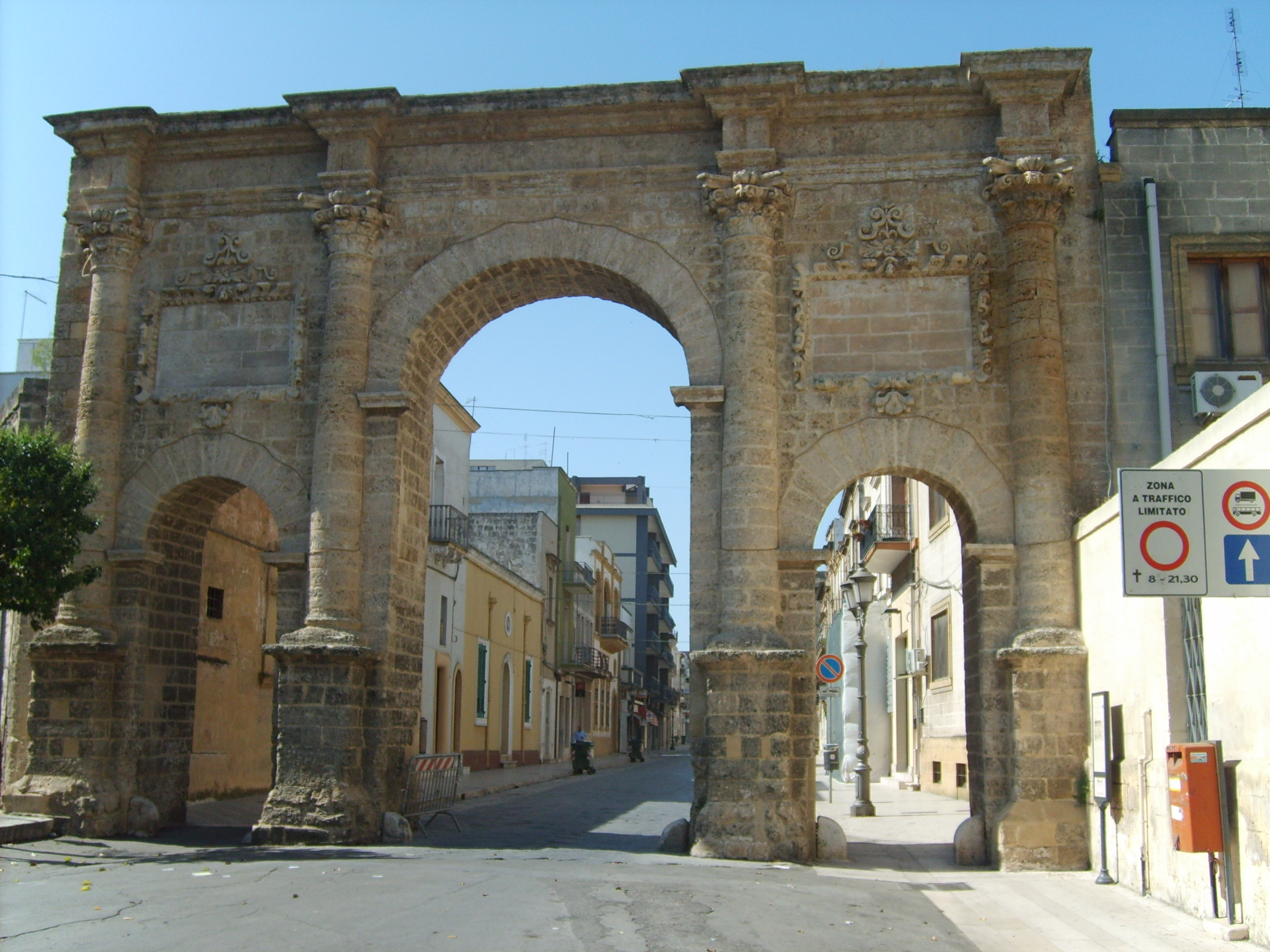 Porta del Carmine